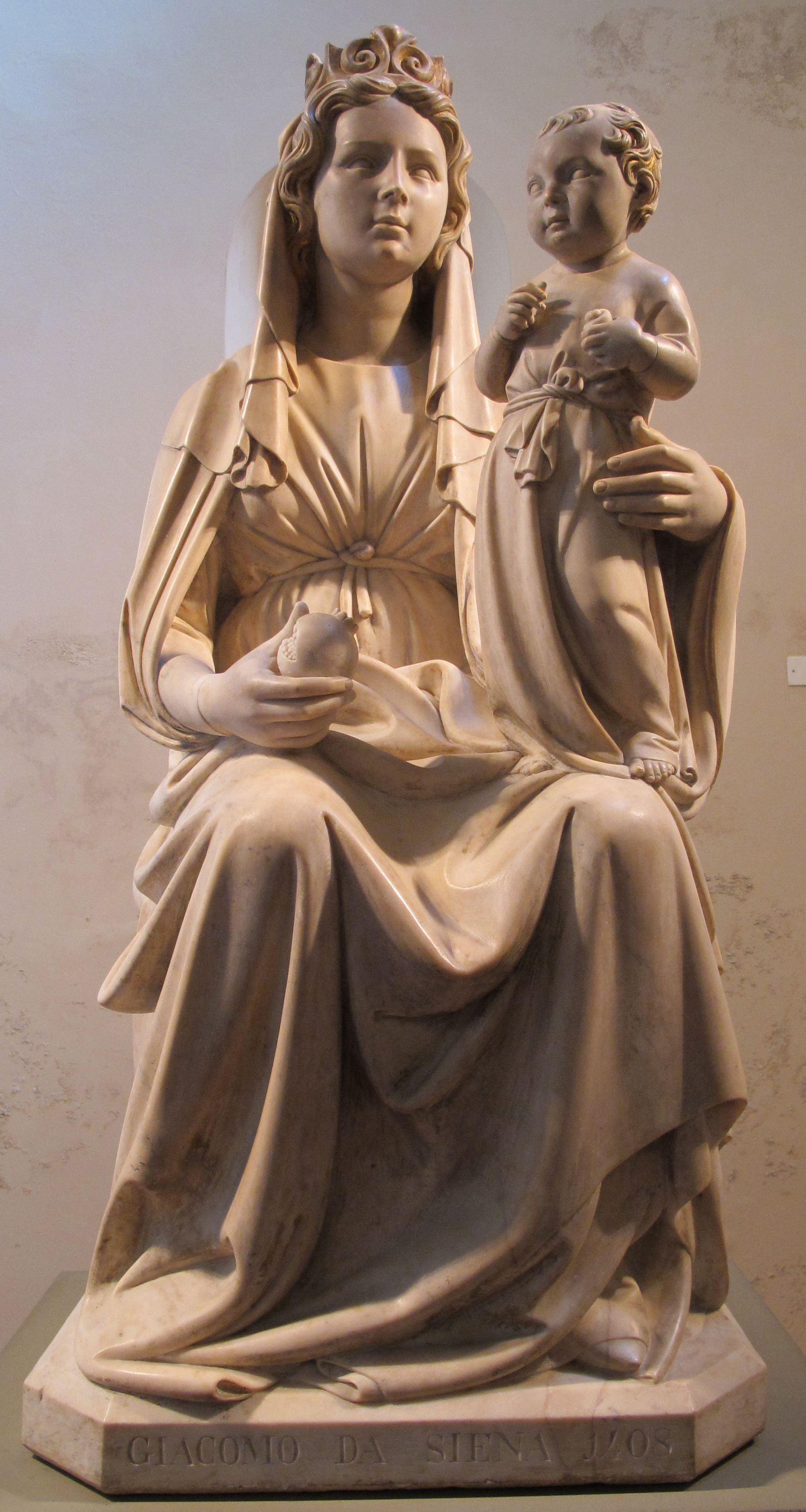 Museo della Cattedrale This is a photo of a monument which is part of cultural heritage of Italy.